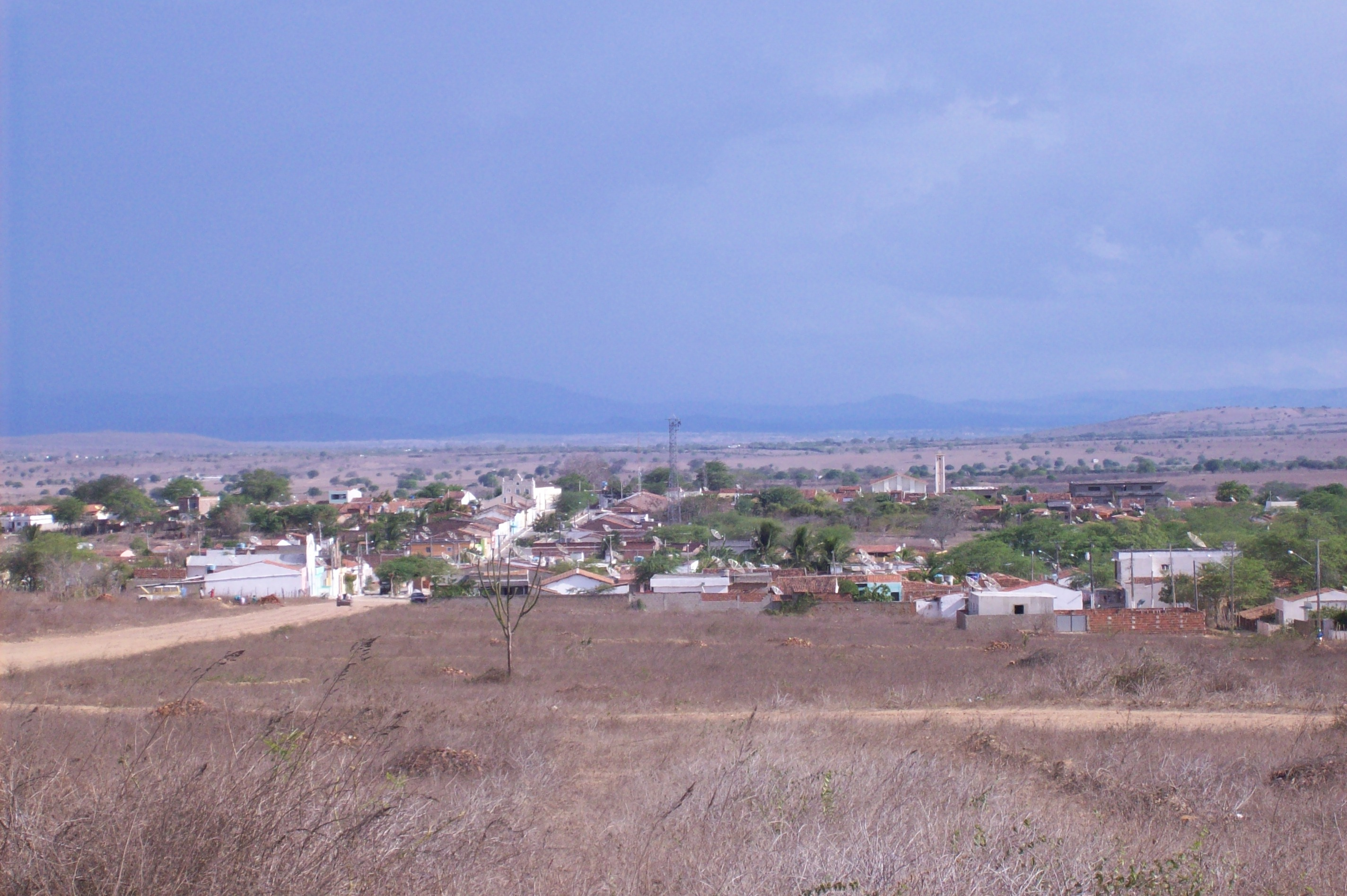 Vista panorâmica de Lagoa de João Carlos, bairro do município de Frei Miguelinho, Pernambuco, Brasil.